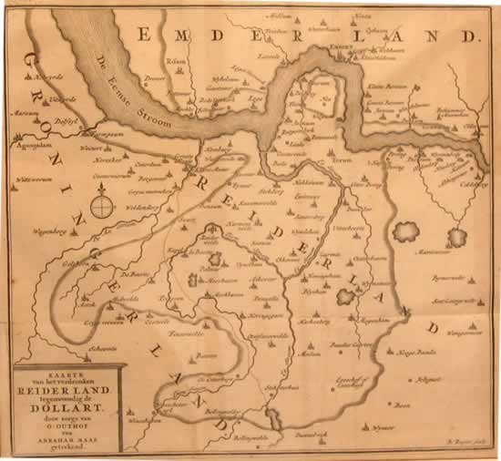 Karte Das Reiderland im Mittelalter durch Abraham Maas, 1720, nach älteren Vorlagen.